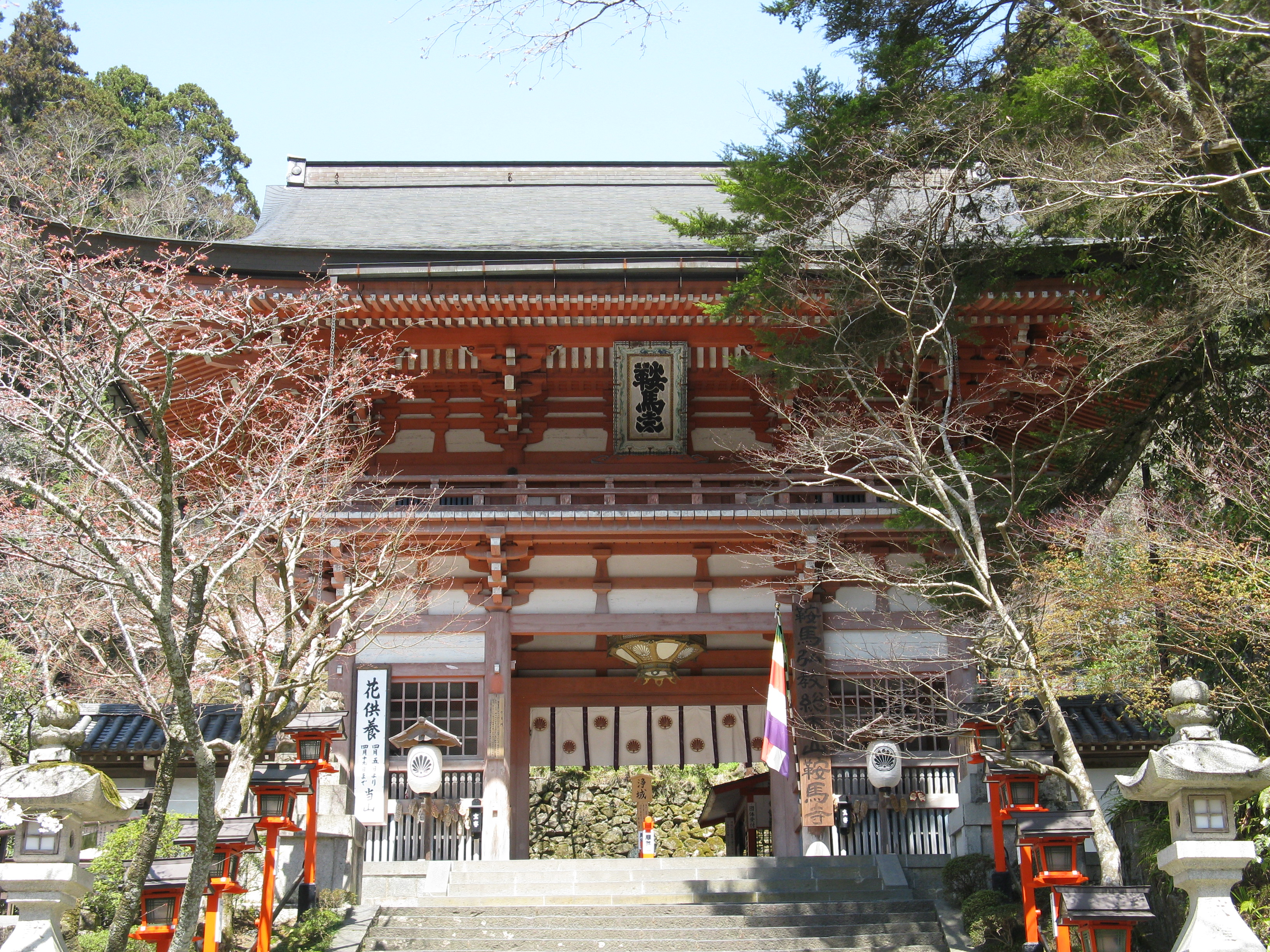 鞍馬寺 山門